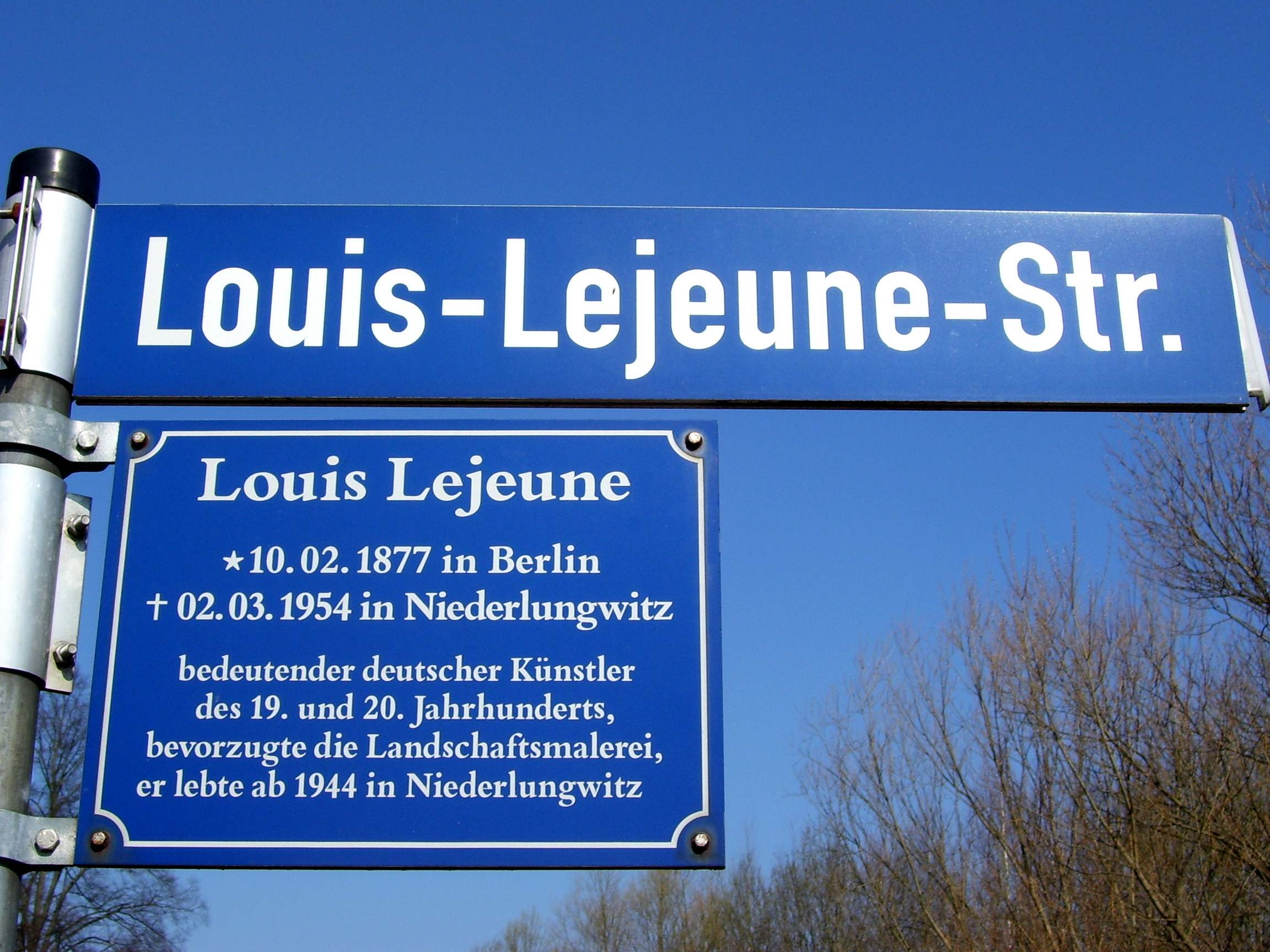 Straßenschild der Louis-Lejeune-Straße in Glauchau, OT Niederlungwitz